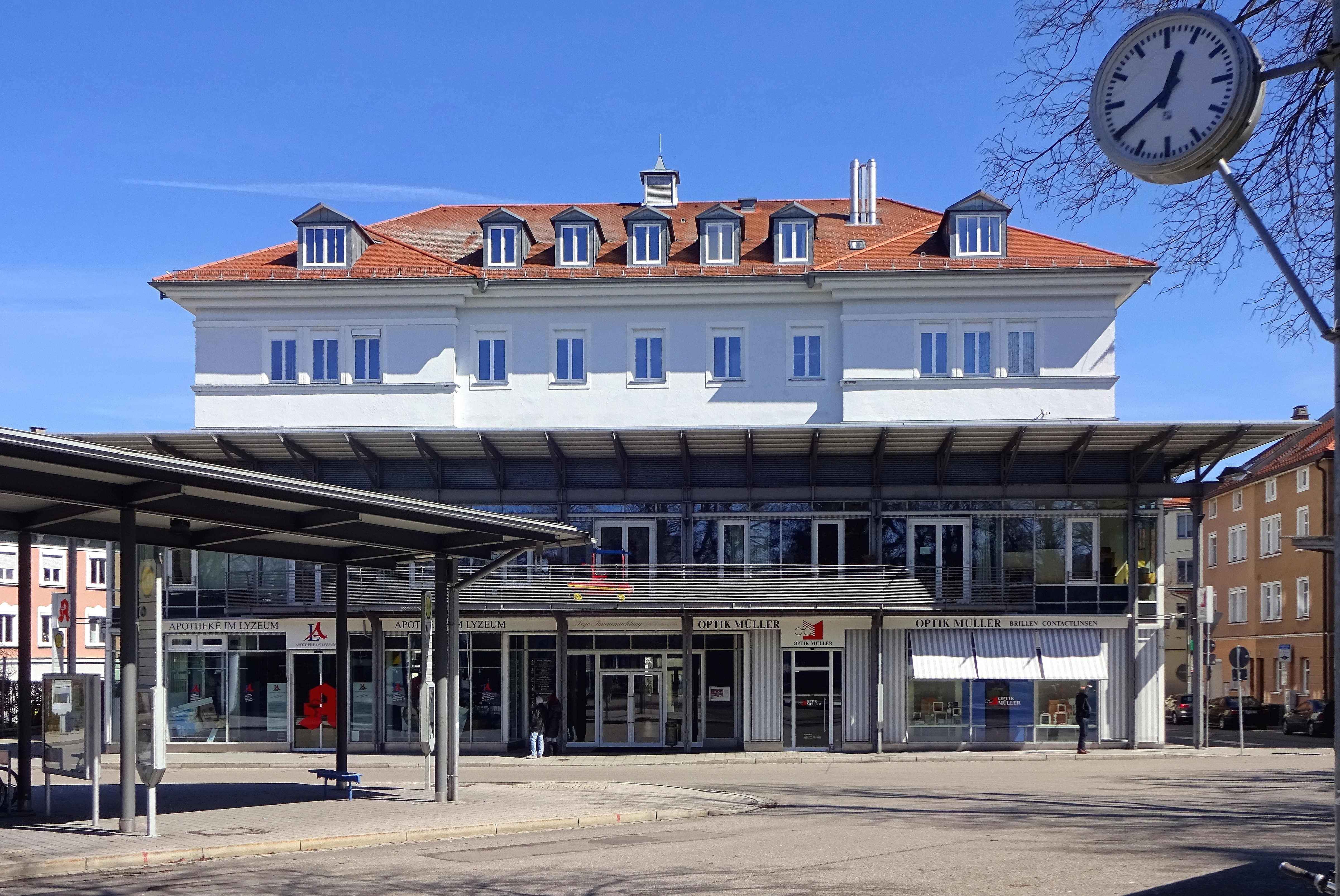 April 2015